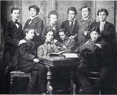 «Реалісти», учні Єлисаветградського реального земського училища, 1881-й. Крайній з правого боку — Тарковський (стоїть), третій зліва — Чикаленко (сидить)